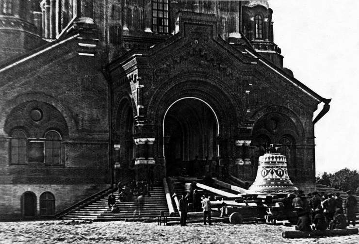 Самара. Поднятие колокола "Благовест" на колокольню Кафедрального собора. Фотография. 1893 год.